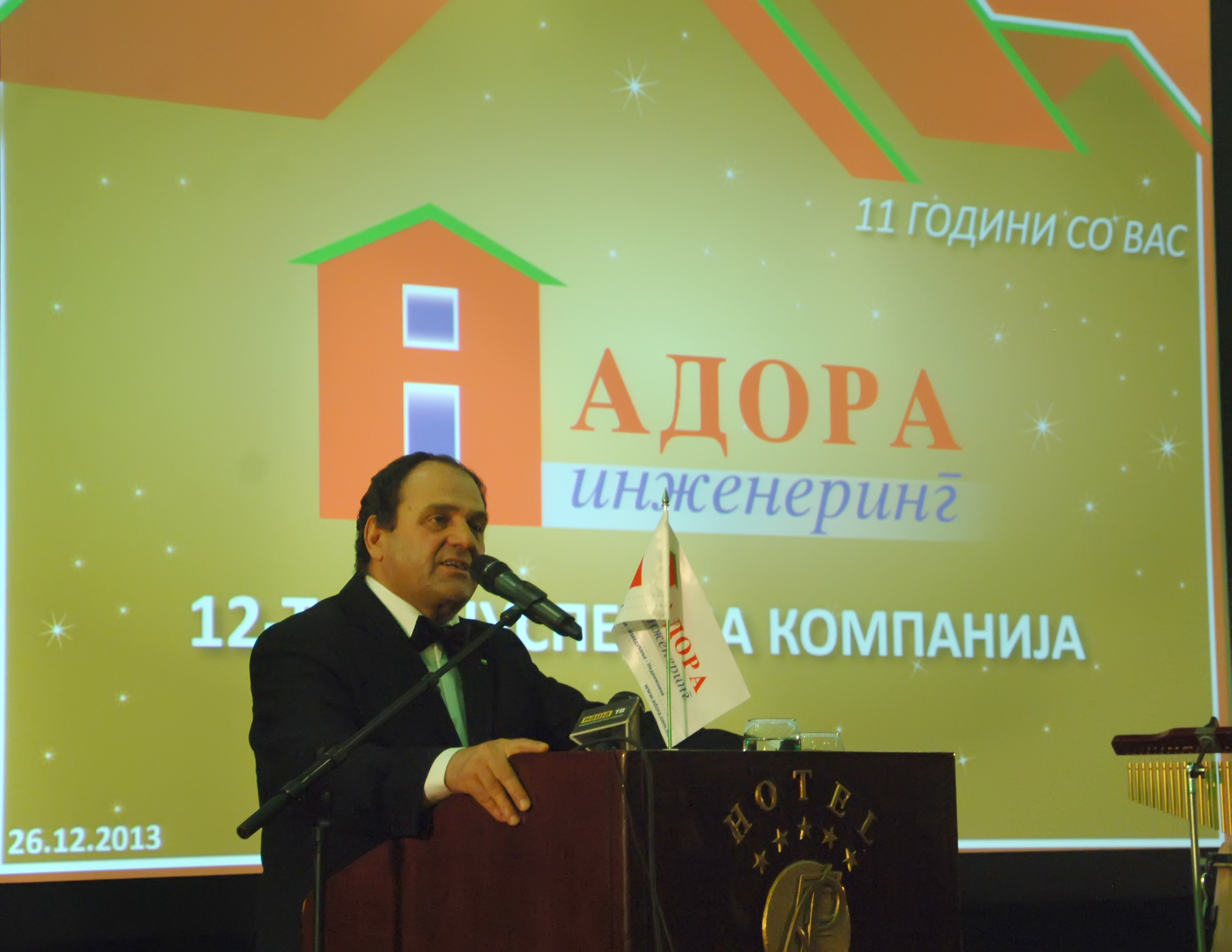 Menagerot Vanco Cifliganec na godishnina na Adora inzenering